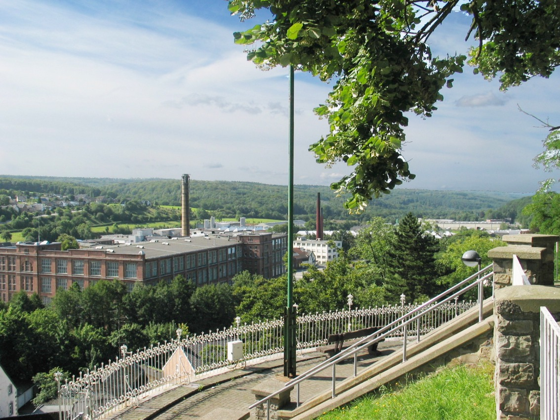 Blick auf das Gebäude der ehemaligen Spinnerei „Kammgarnwerke“. Heute Bestandteil des Gebäudekomplexes der Kabelwerk Eupen AG